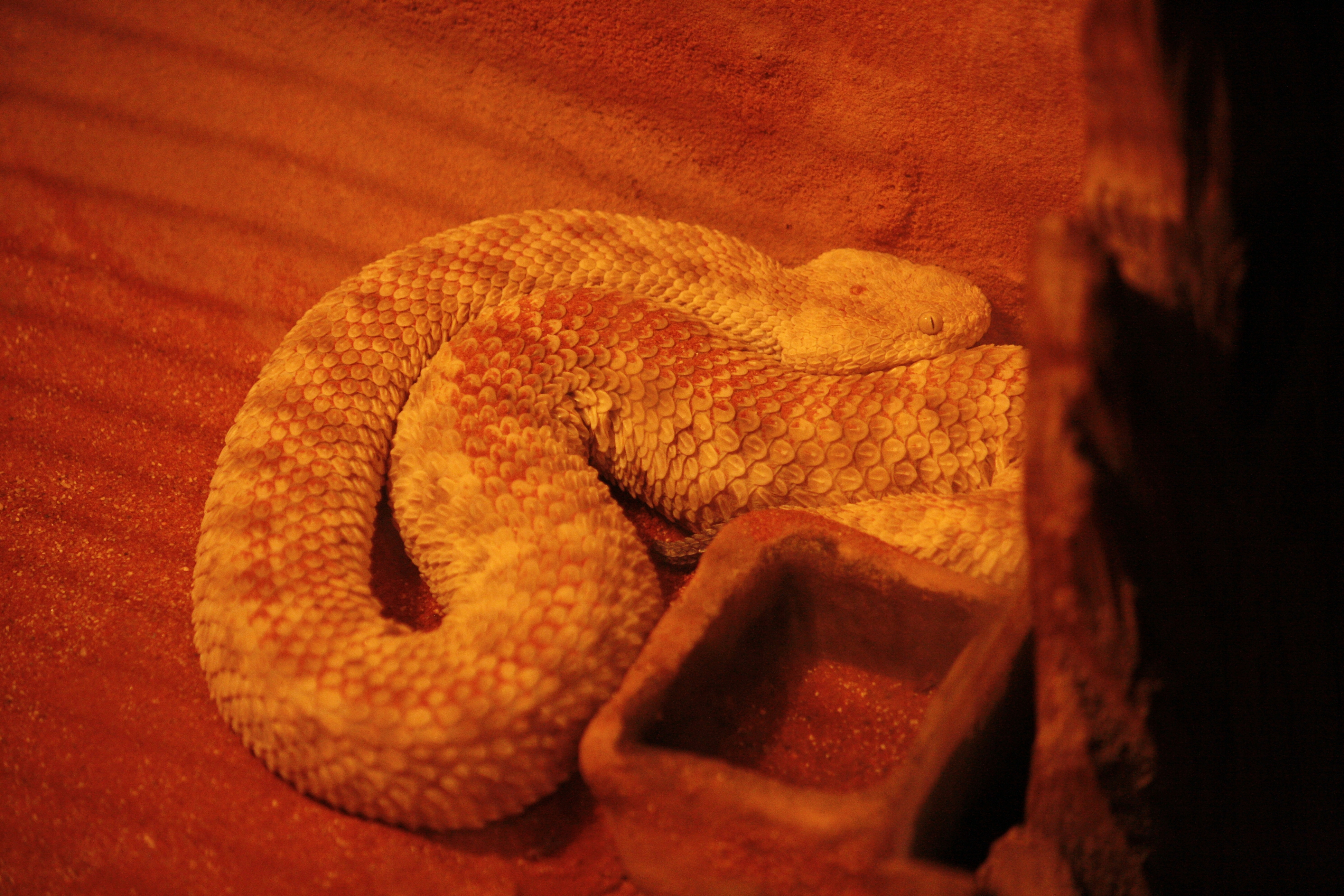 Zoo Praha